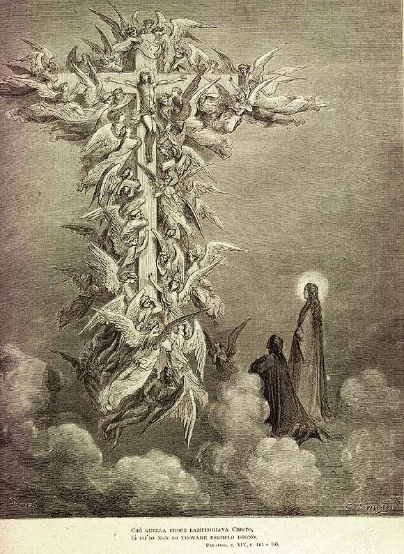 Paradiso by Dante Alighieri Illustration